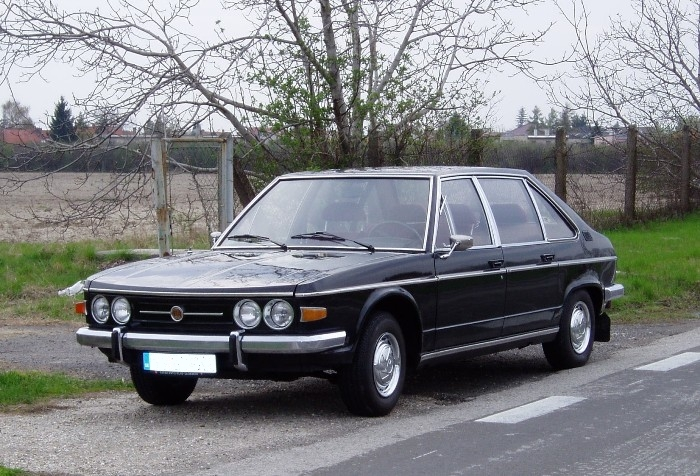 Tatra 613-2/I (1984), 165 HP, 190 km/h Photo: Ondrej Ertl (2006)